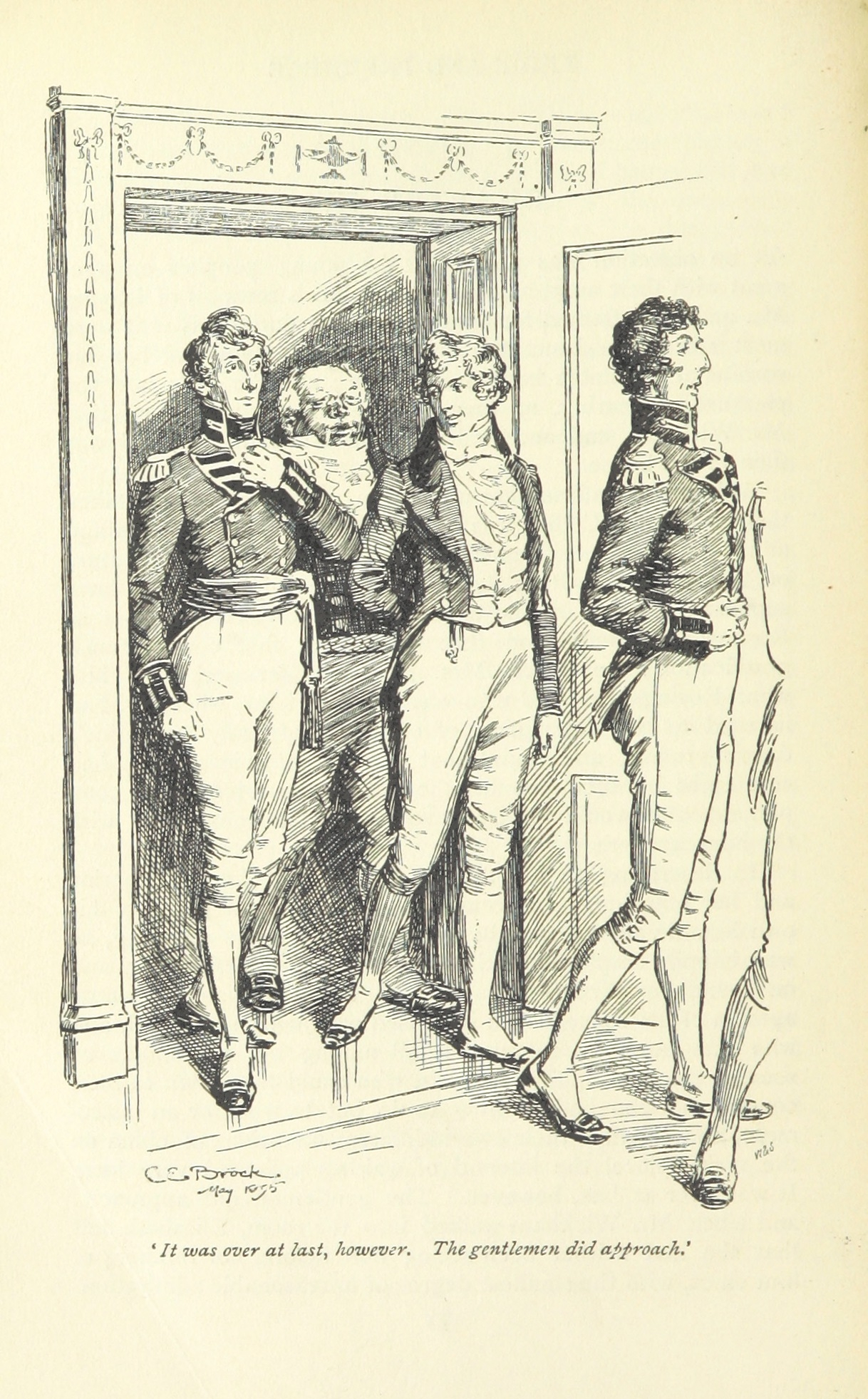 Illustration de C. E. Brock pour Pride and Prejudice (Edition MacMillan & C°, ch.16) Arrivée de Wickham avec les officiers